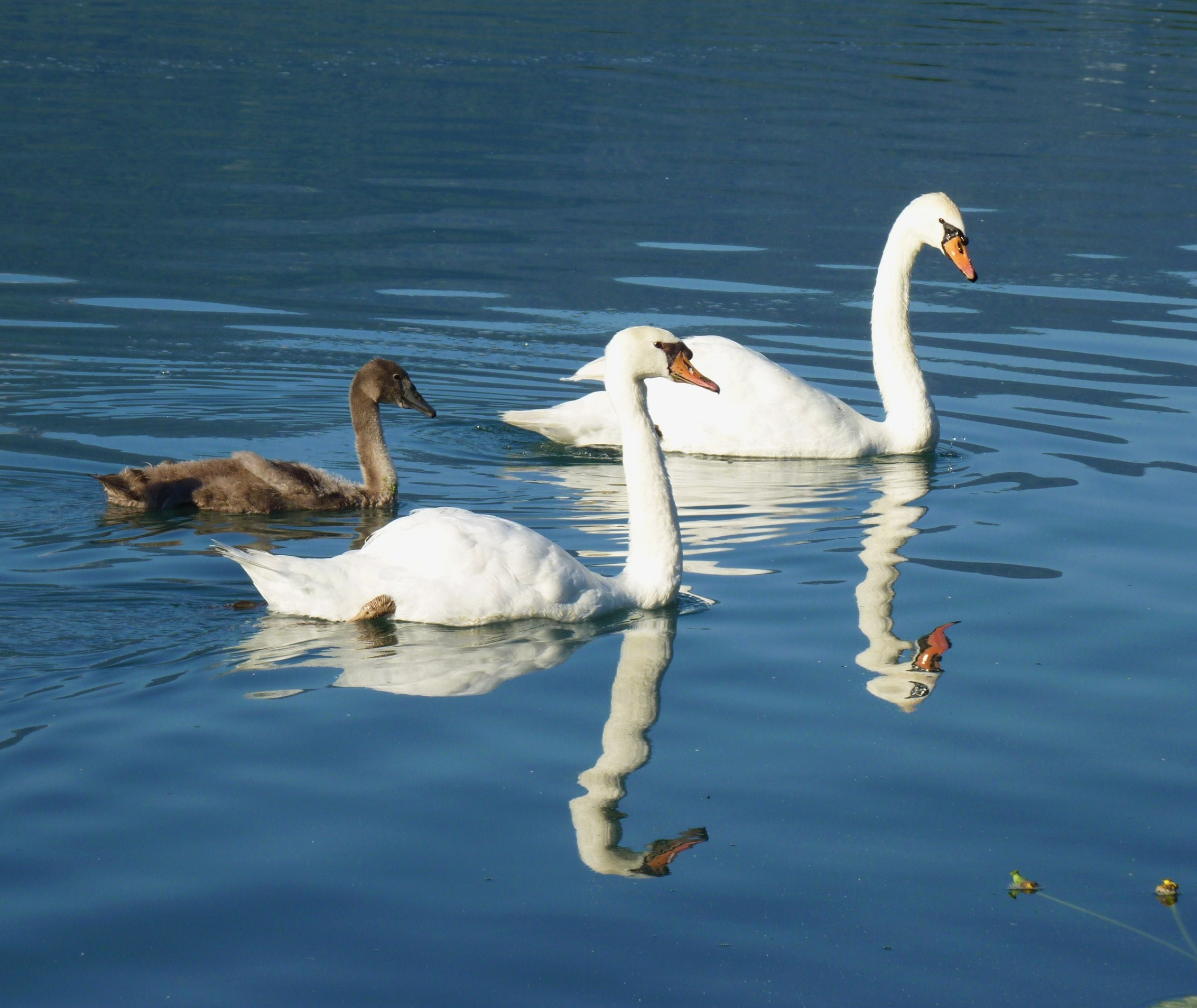 Höckerschwan (Cygnus olor)